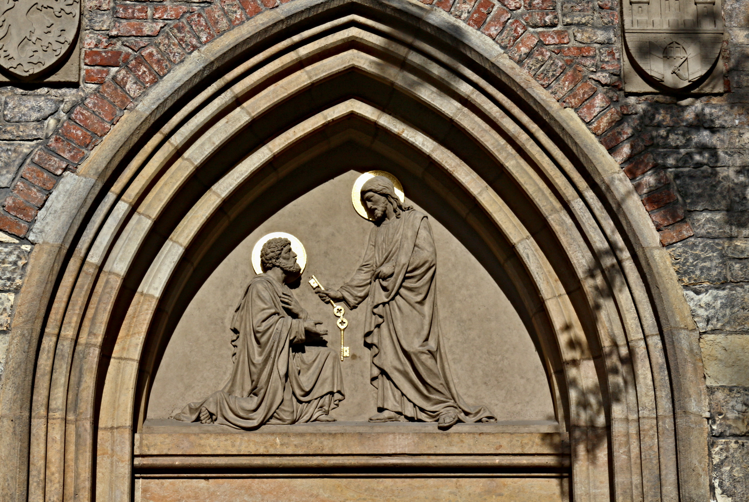 Kostel svatého Petra Na Poříčí